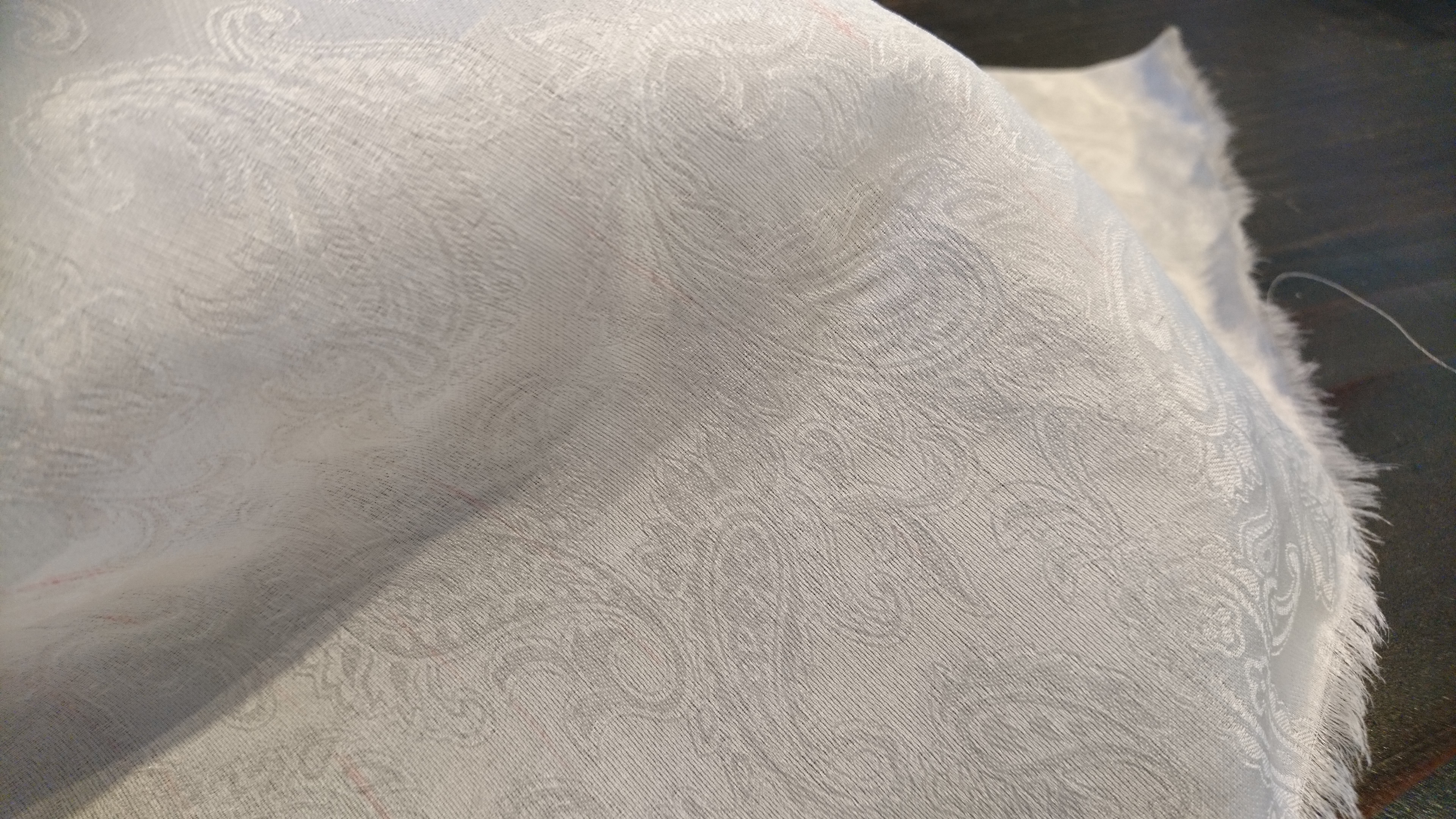 織り上げたばかりで精錬していない丹後ちりめんの生地。セリシンや糊などの不純物が付着しており、ゴワゴワとやや硬い手触りがする。これらを洗い流し、灰汁で4時間煮沸すると撚りが戻り、シボのある美しく柔らかい縮緬となる。